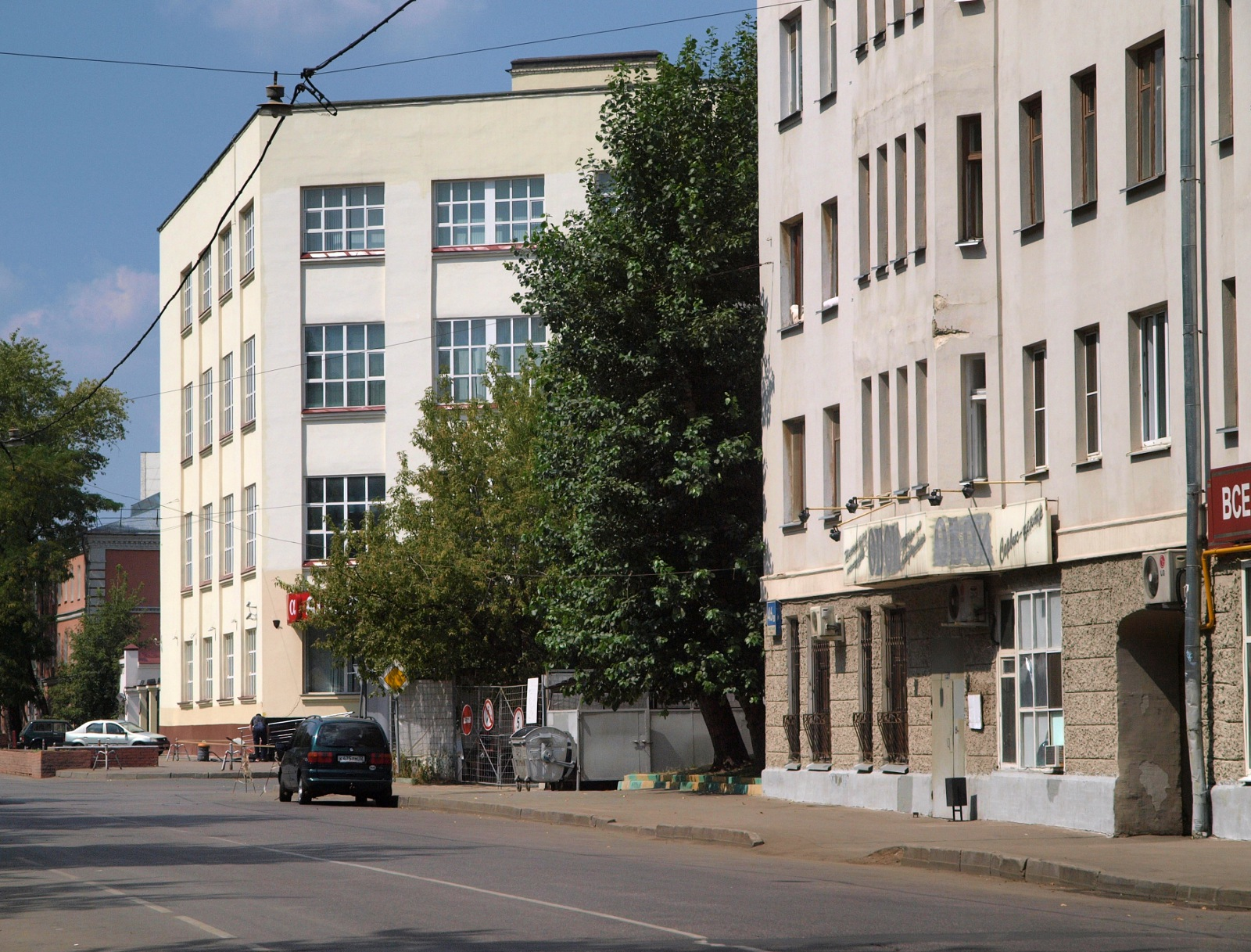 Угол Хавской и Конного переулка, Москва.